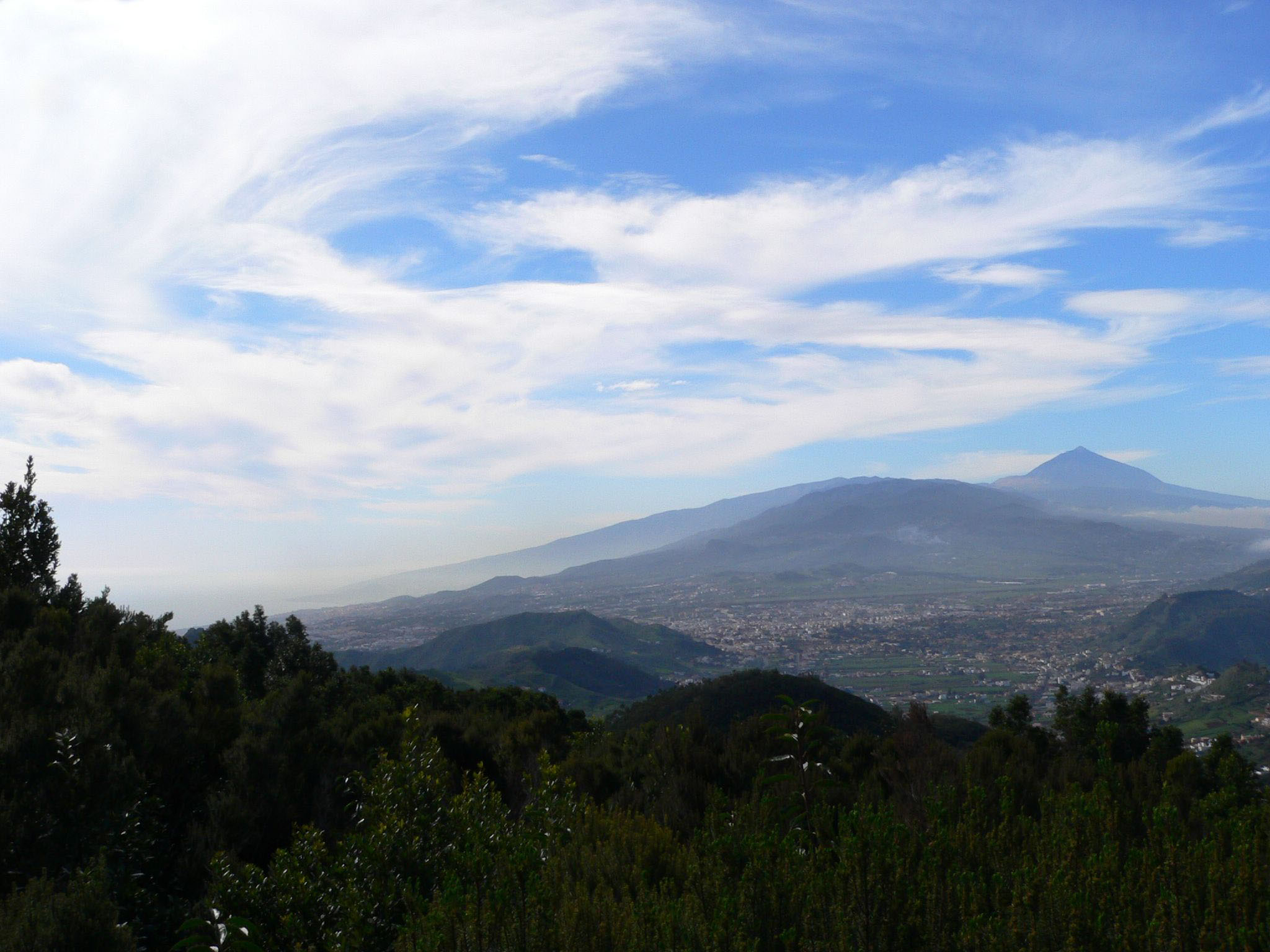 Vista del Teide y La Laguna desde la Cruz del Carmen.